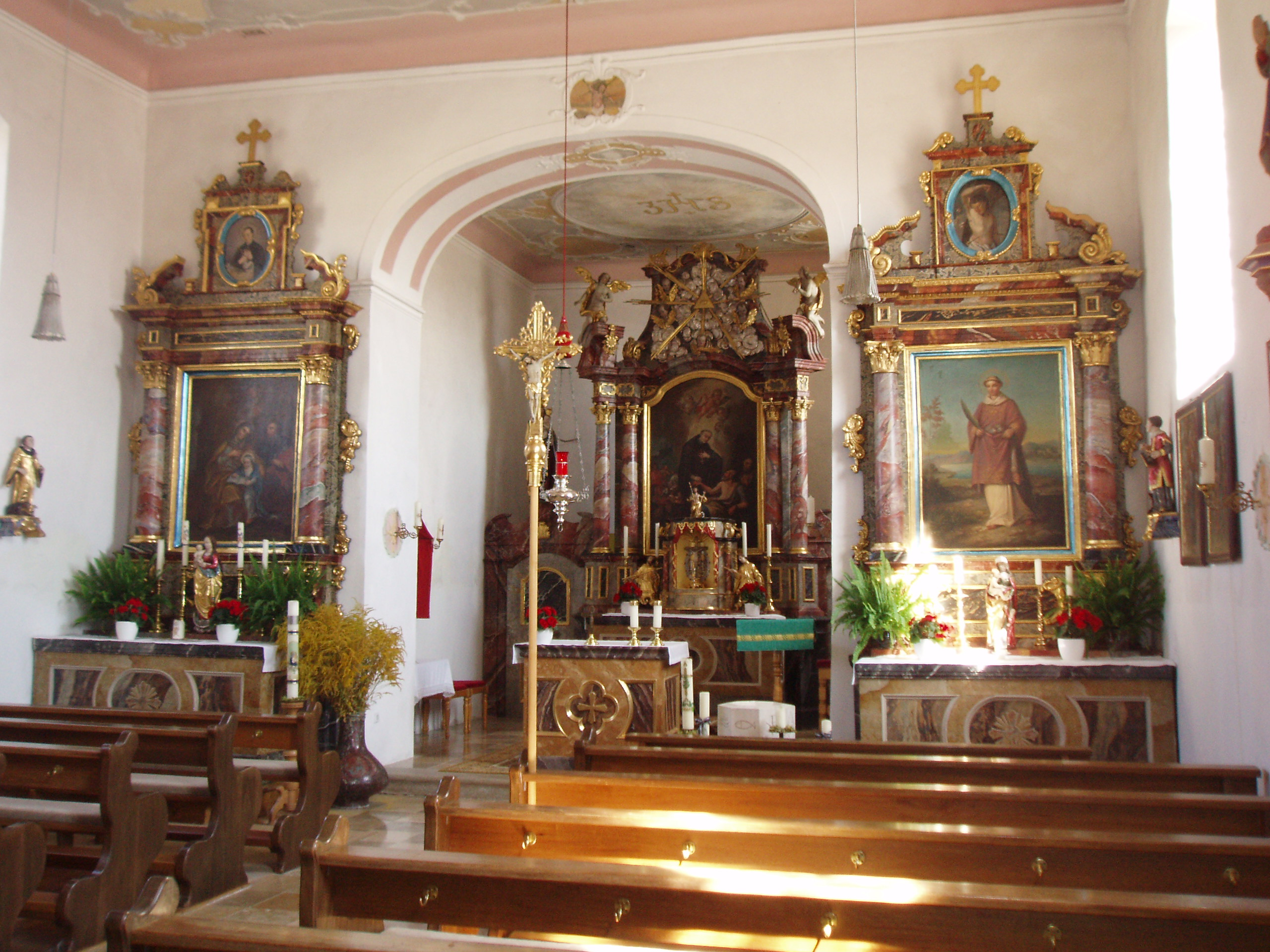 Hirnstetten_im_Landkreis_Eichstätt_barockes_Kircheninneres